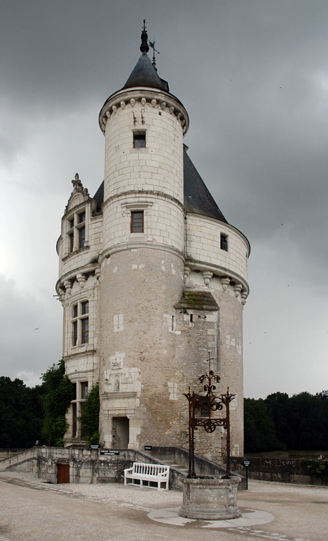 Der Tour des Marques des Schlosses Chenonceau, von Norden gesehen